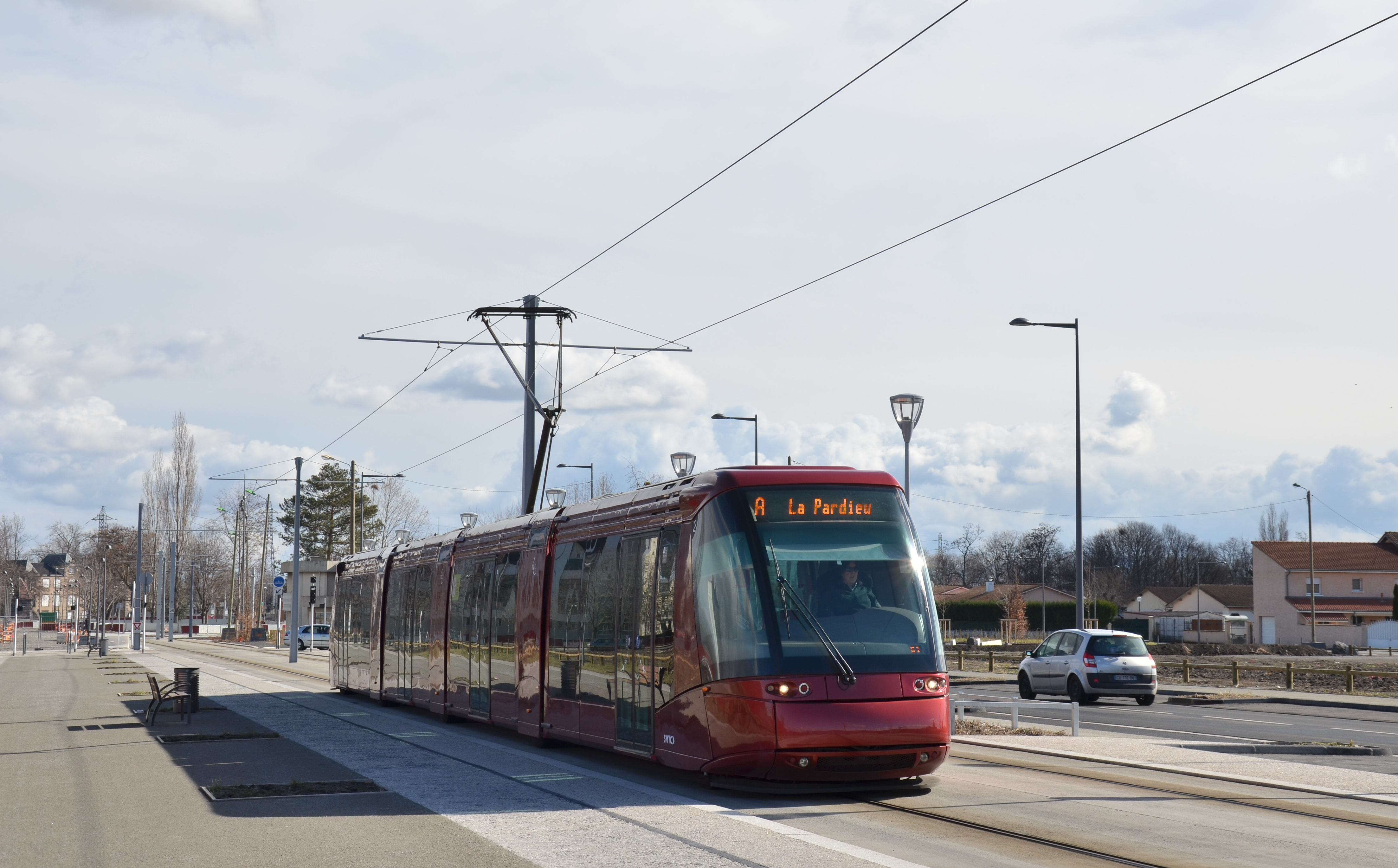 Tramway sur pneus Translohr STE4 n°2 du réseau T2C de Clermont-Ferrand, près de l'arrêt Stade Gabriel Montpied.